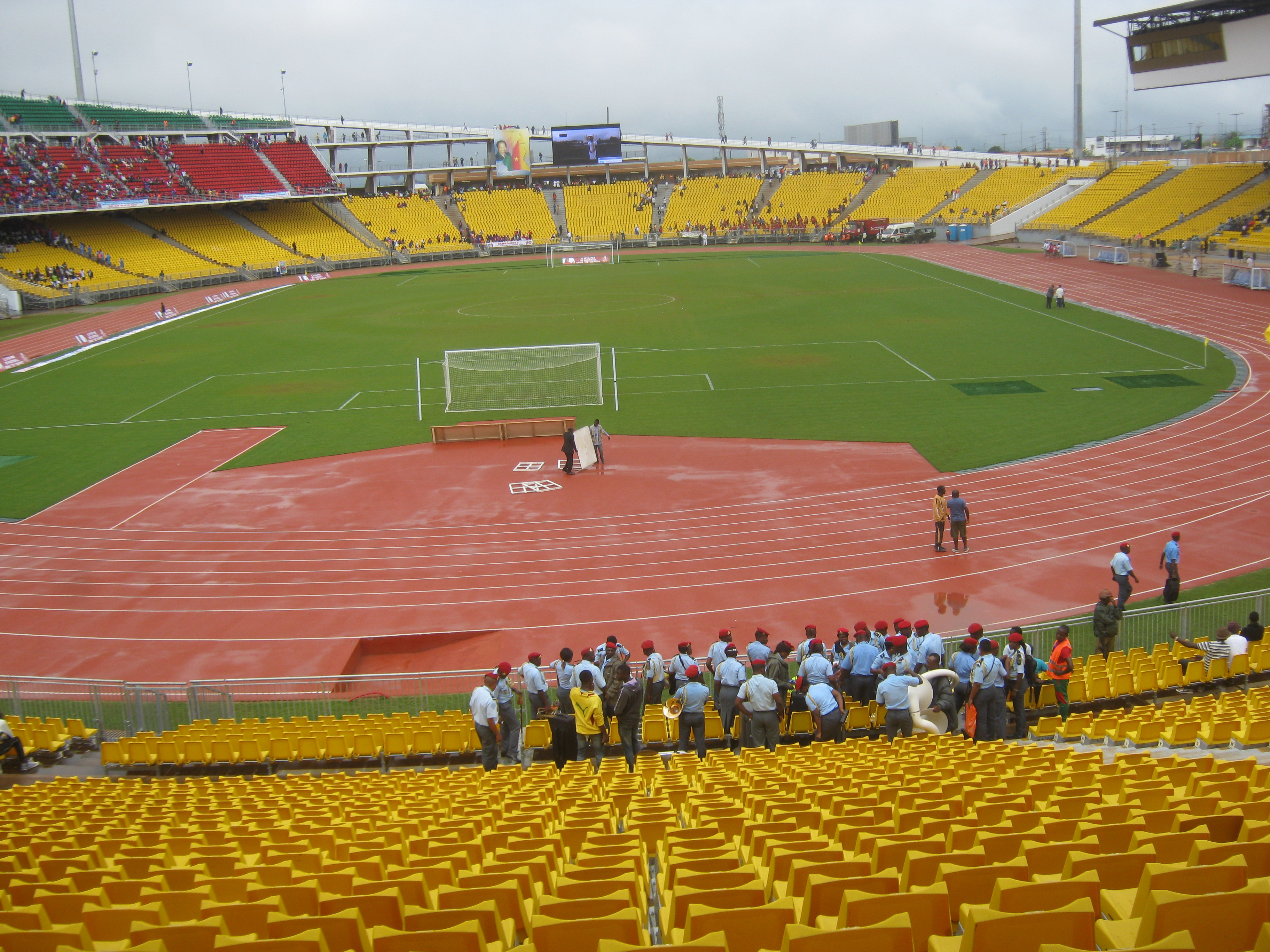 Le stade omnisports Ahmadou Ahidjo a été entièrement rénové pour le bonheur des fans du football camerounais.